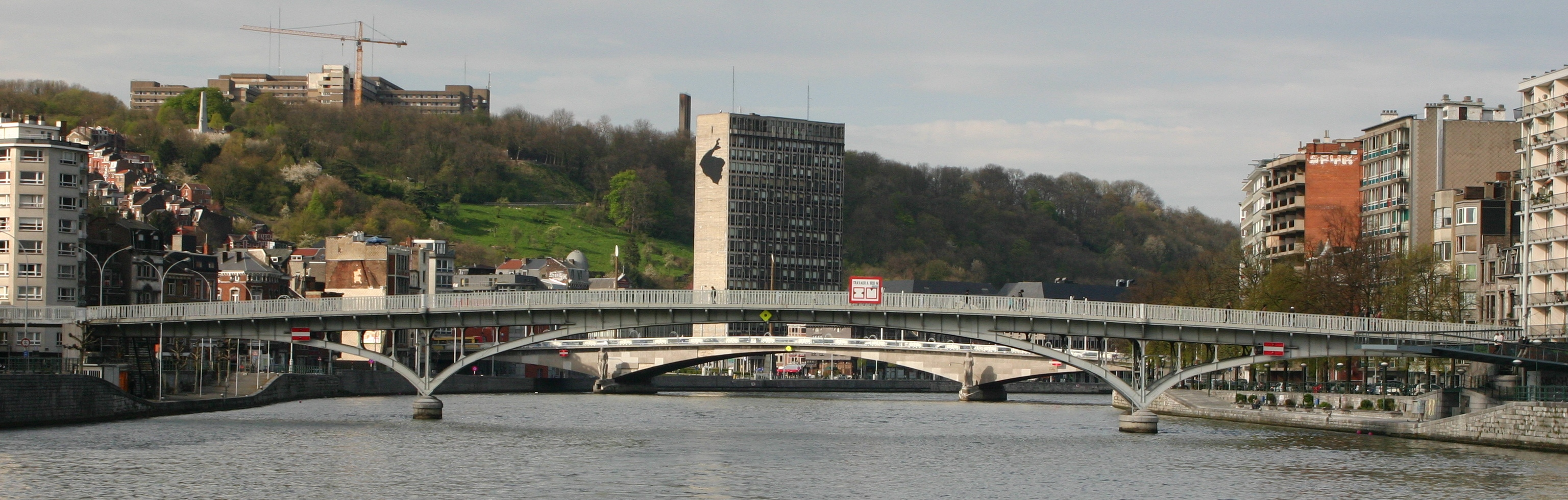 Passerelle Saucy vu flossop gesinn. Hannen am Bild de Pont des Arches, a lénks uewen den Hôpital de la Bastille. Kategorie:Brécken an der Belsch